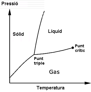 Diagrama de fases Template:DP-usuari